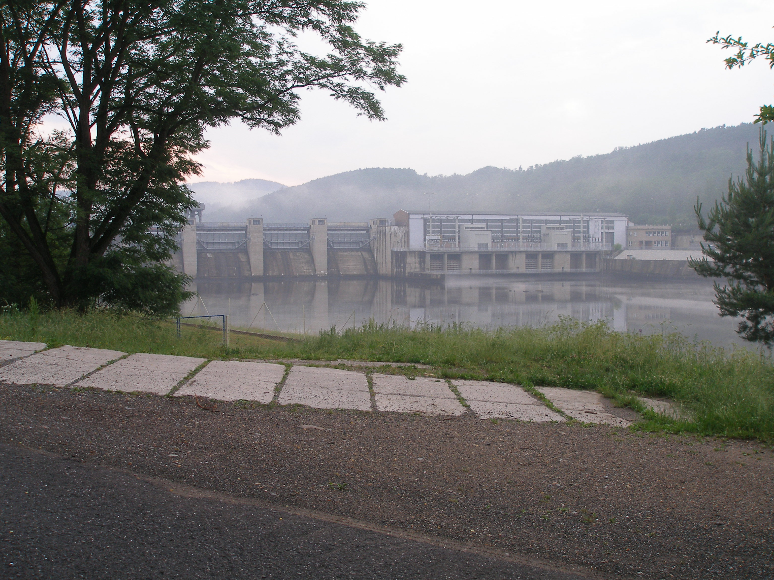 Přehradní hráz v Kamýku nad Vltavou